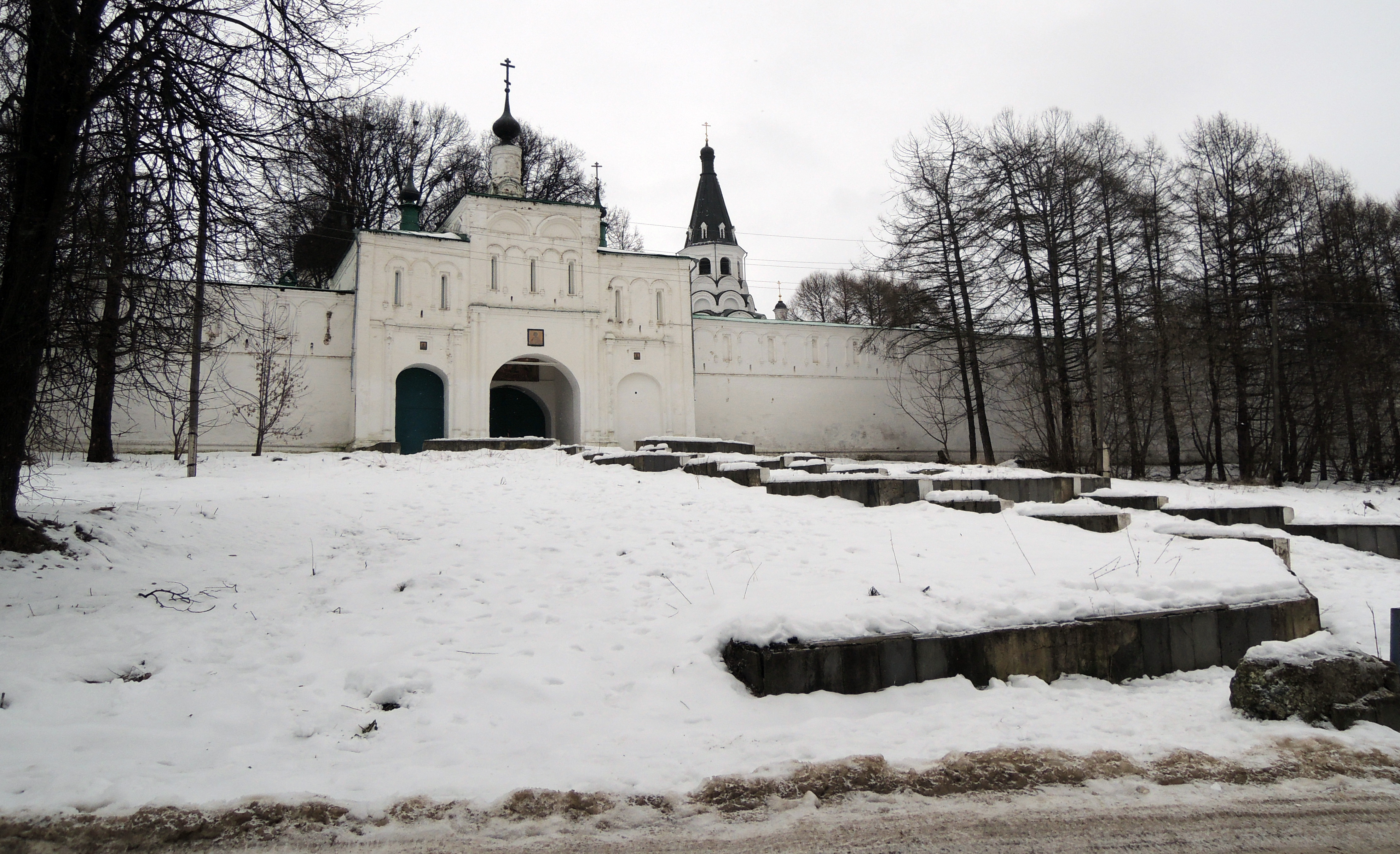 Александровская слобода. Церковь великомученика Федора Стратилата (Надвратная церковь) c Никоновским корпусом